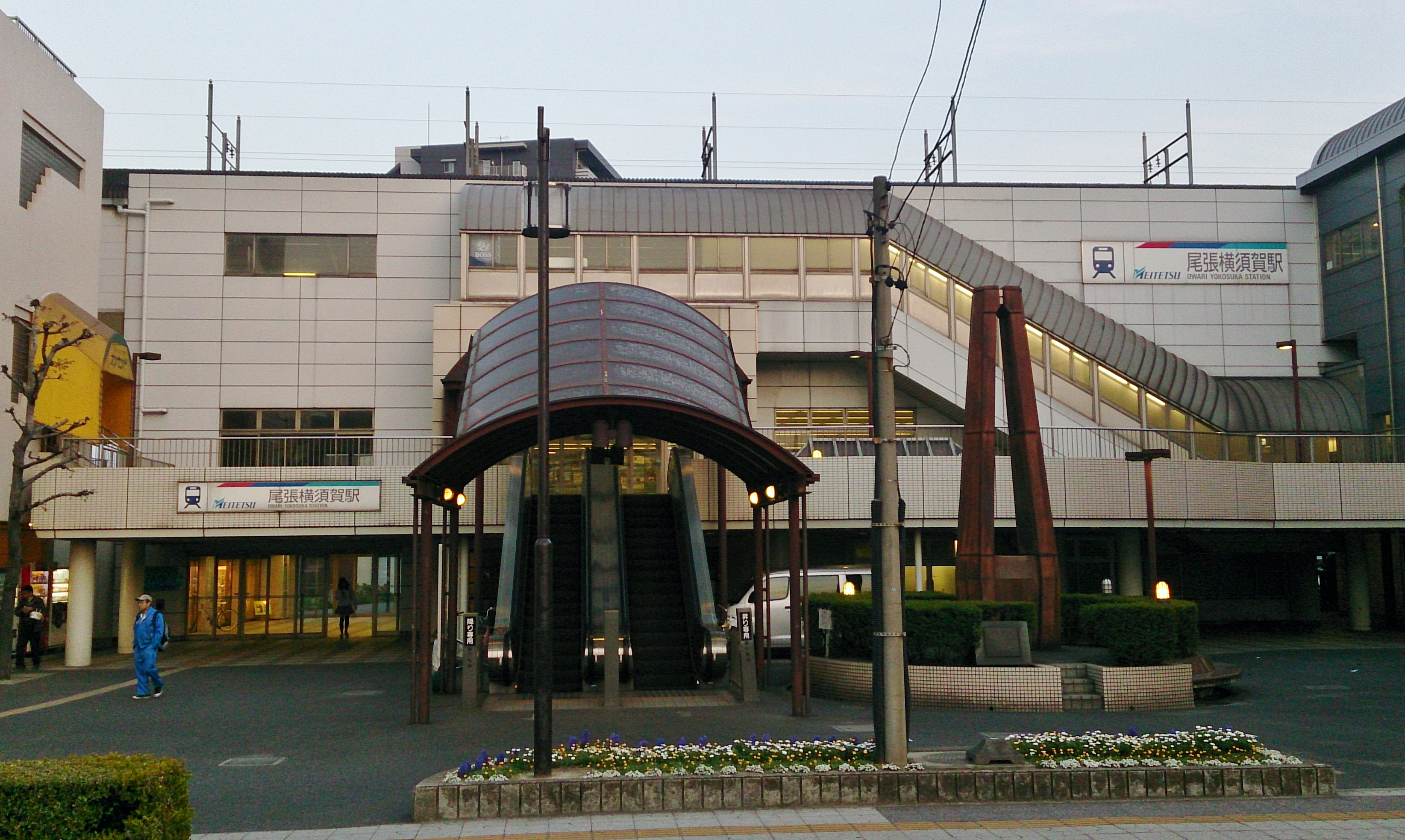 駅舎西側 (2015年4月)